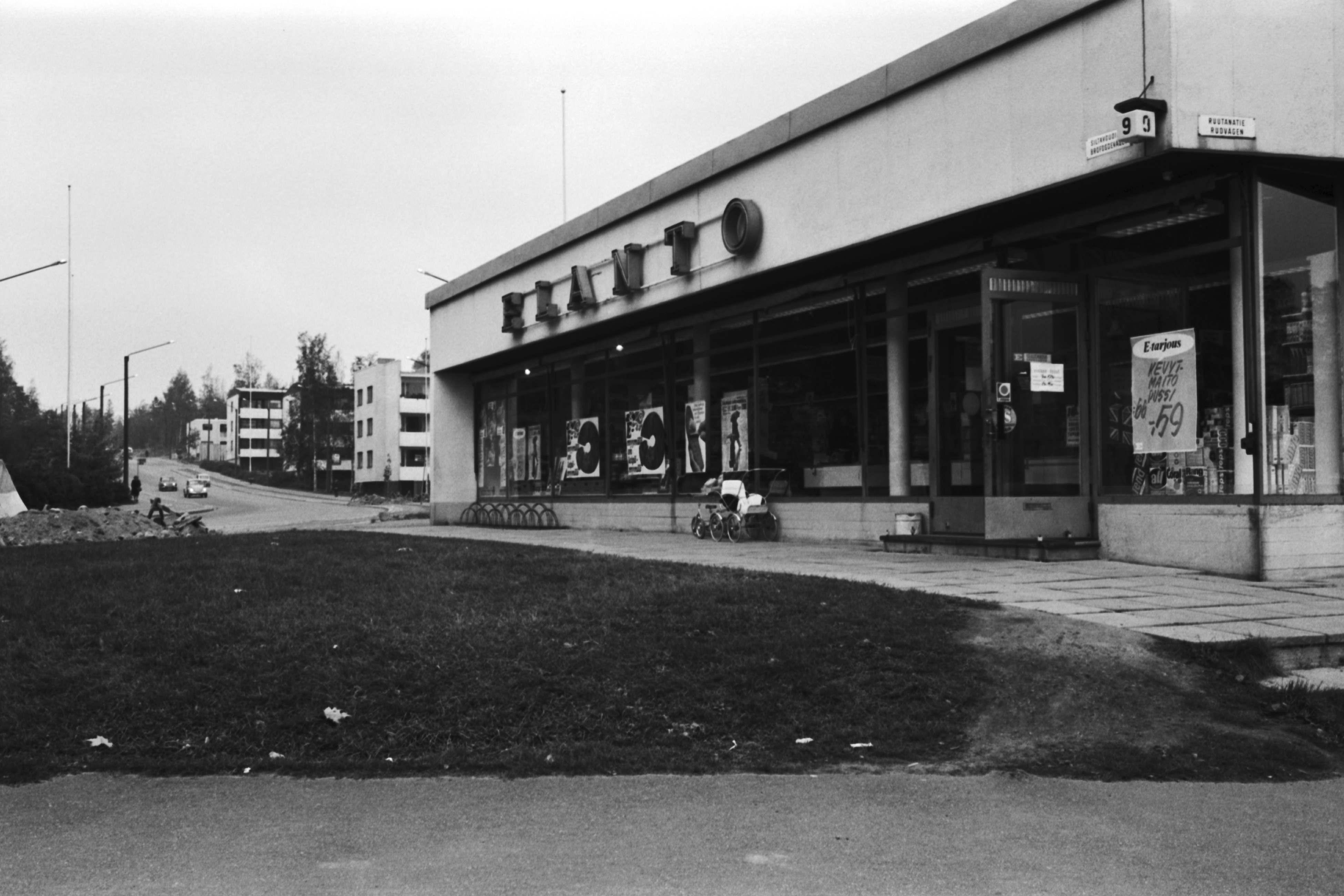 Elannon rakennus (Siltavoudintie 9) Siltavoudintien ja Ruutanatien kulmassa Oulunkylän Patolassa.